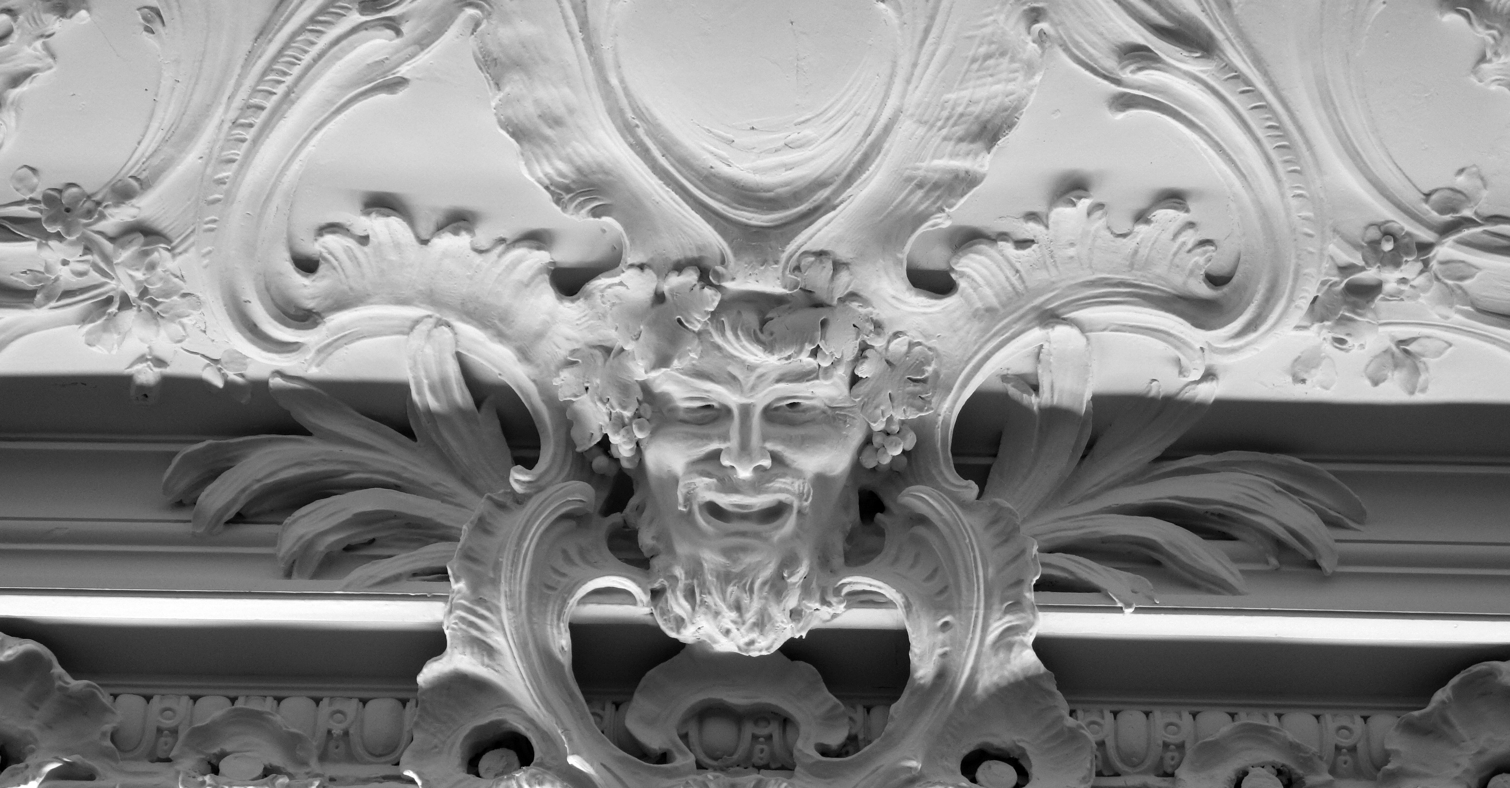 Restaurations- und Wohngebäude, Annahof